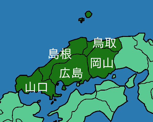 中国地方の自治体